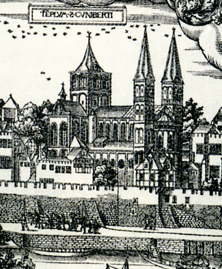 Ausschnitt mit St. Kunibert, Woensan 1531-57 aus dem Holzschnitt „Große Ansicht von Köln“